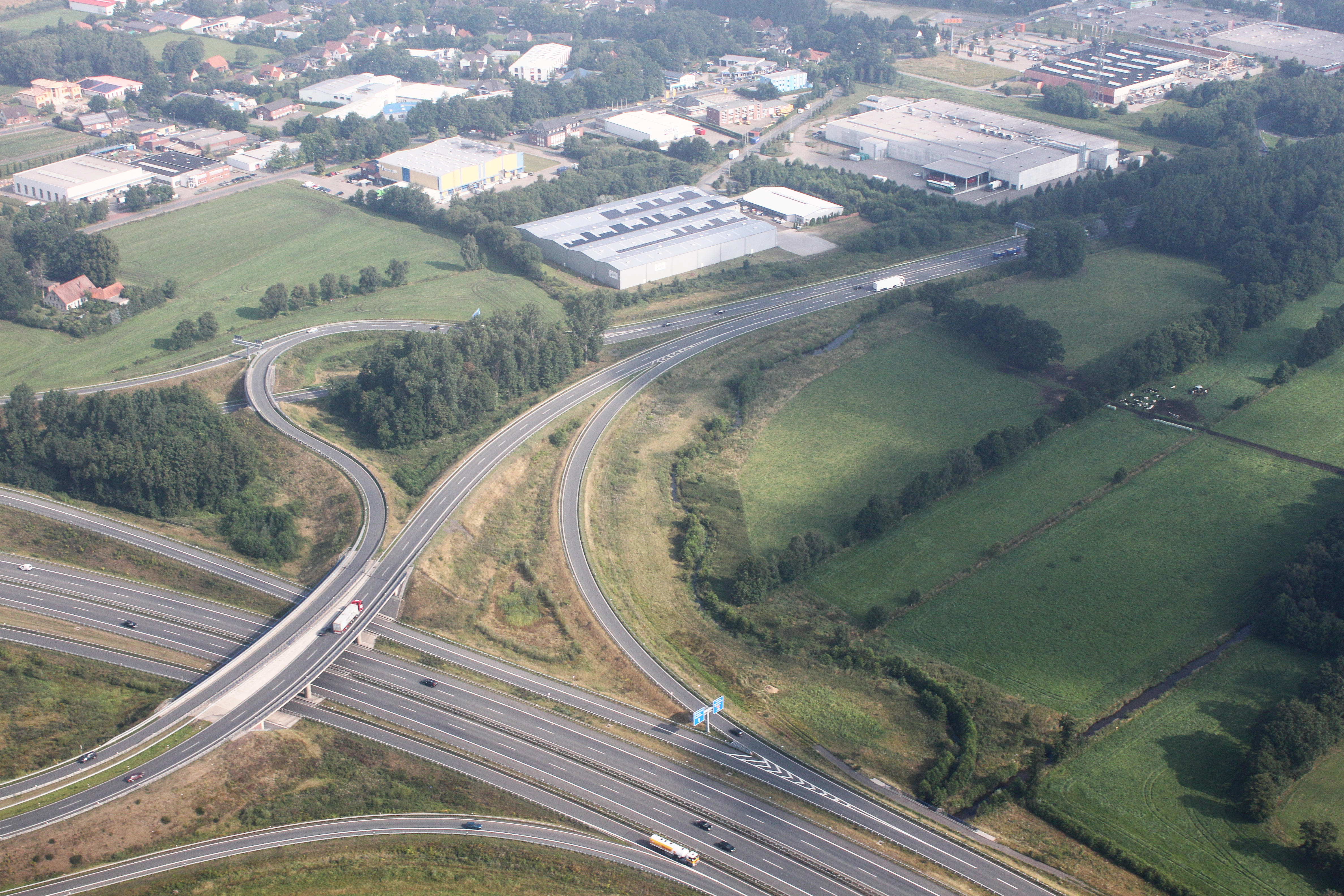 Luftaufnahme Delmenhorst